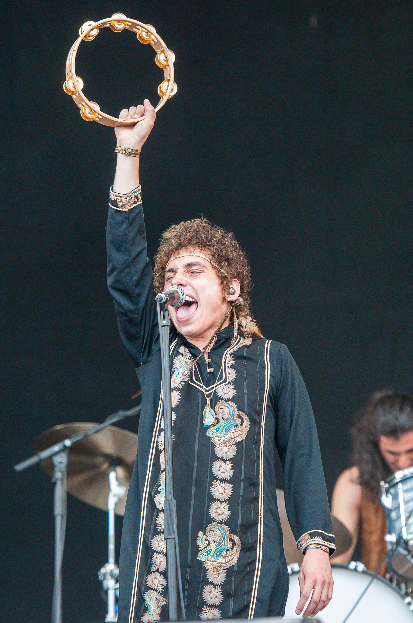 ARGO-Konzerte,Festival,Greta Van Fleet,Joshua Kiszka,Konzert,Livekonzert,Livemusik,Musik,RiP,Rock im Park 2018,Zeppelin Stage